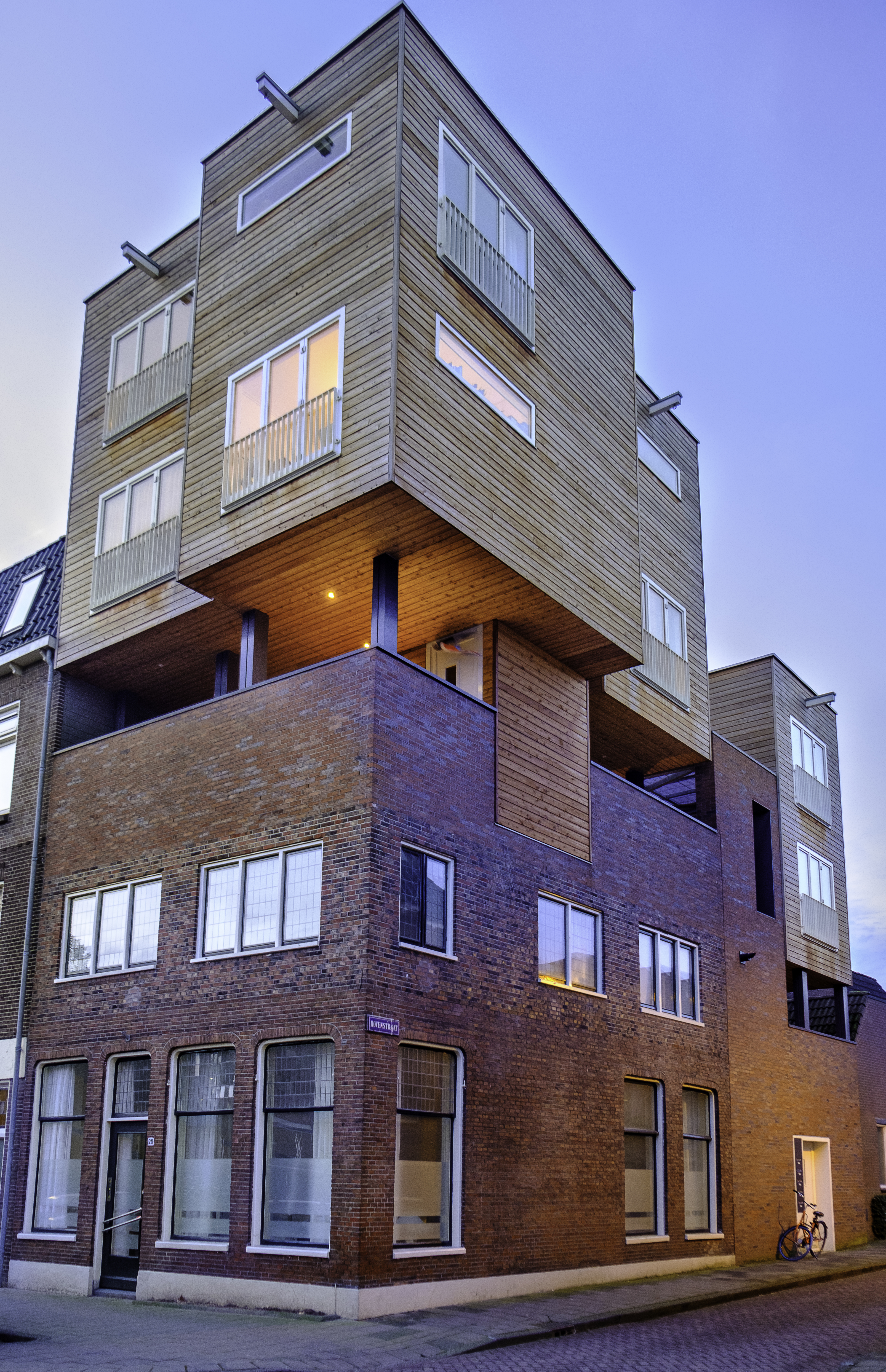 Zogenoemde lighthouses op een pand op de driesprong van de Hovenstraat met de Rabenhauptstraat in Groningen